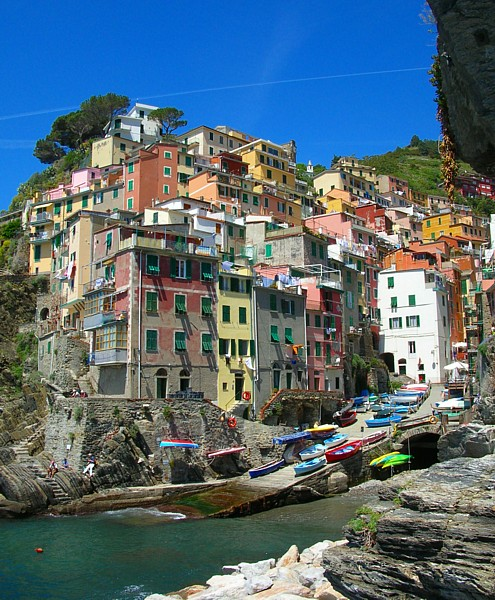 Cinque Terre: Riomaggiore Picture taken by user:Idéfix, august 2005